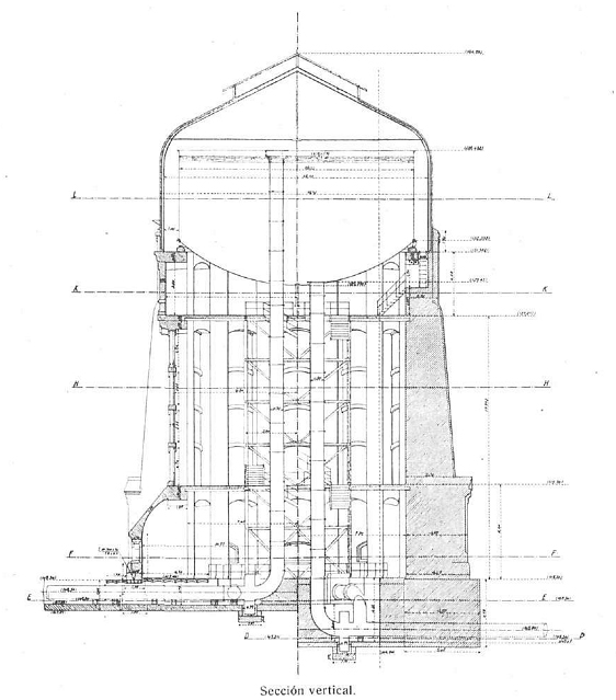 Sección vertical del depósito elevado de Chamberí, recogida en la revista española La Construcción Moderna.